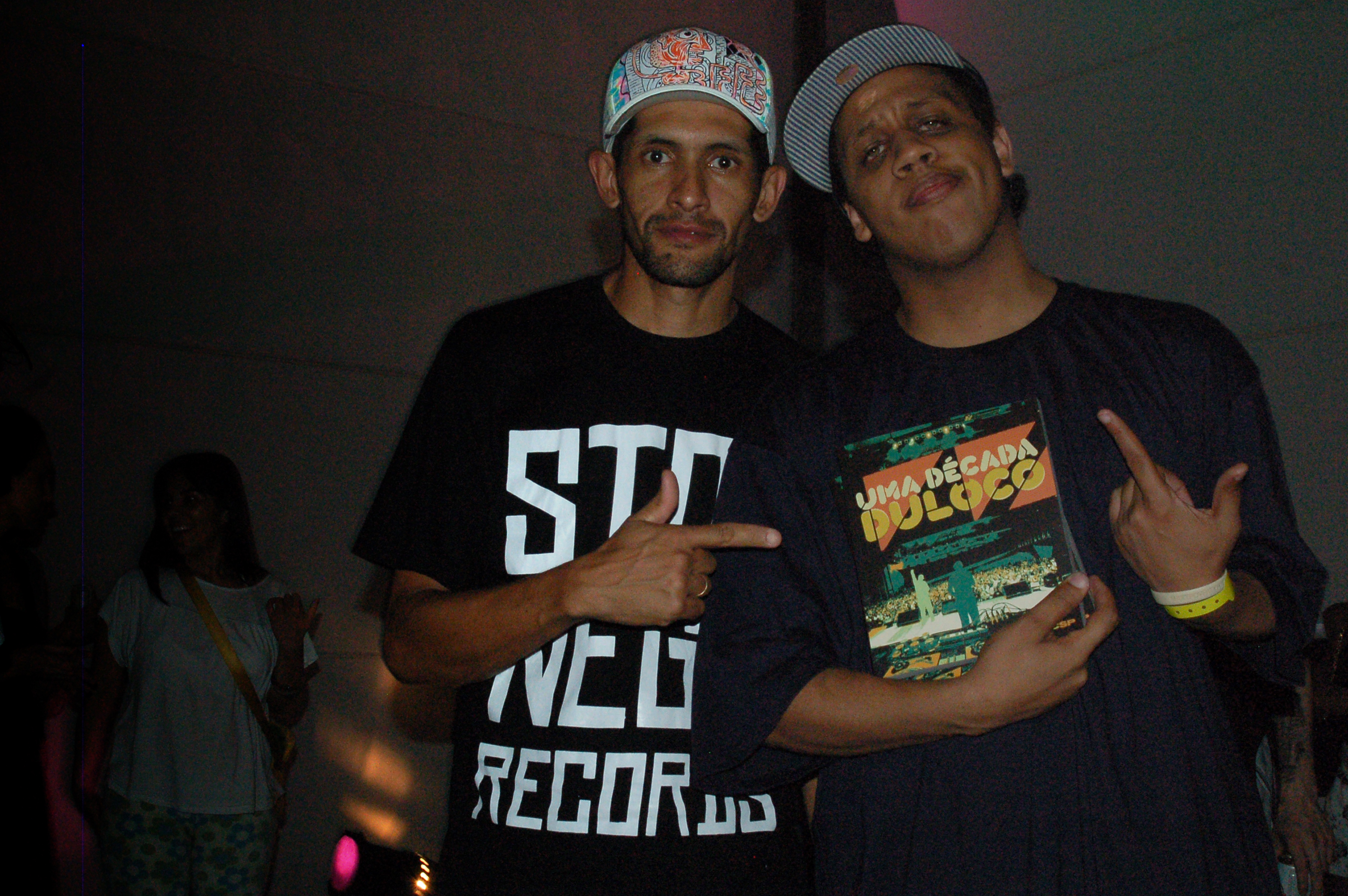 ... com o book de comemoração de 10 anos de Dulôco. Indie Hip Hop '09